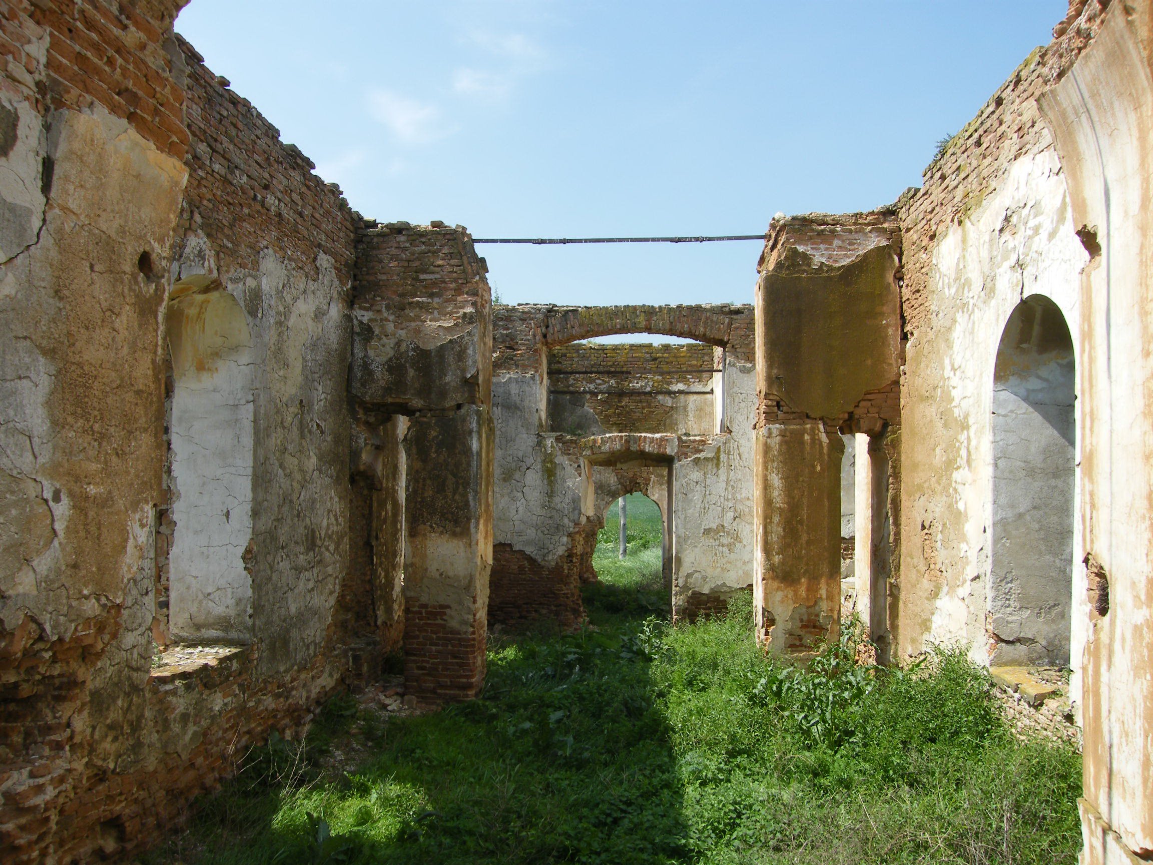 Biserica din satul Filiu comuna Bordei Verde in ruina - Interior Restricţii - fără restricţii